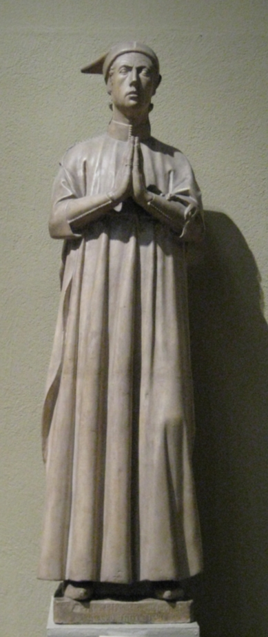 cast, original in cappella degli Scrovegni.